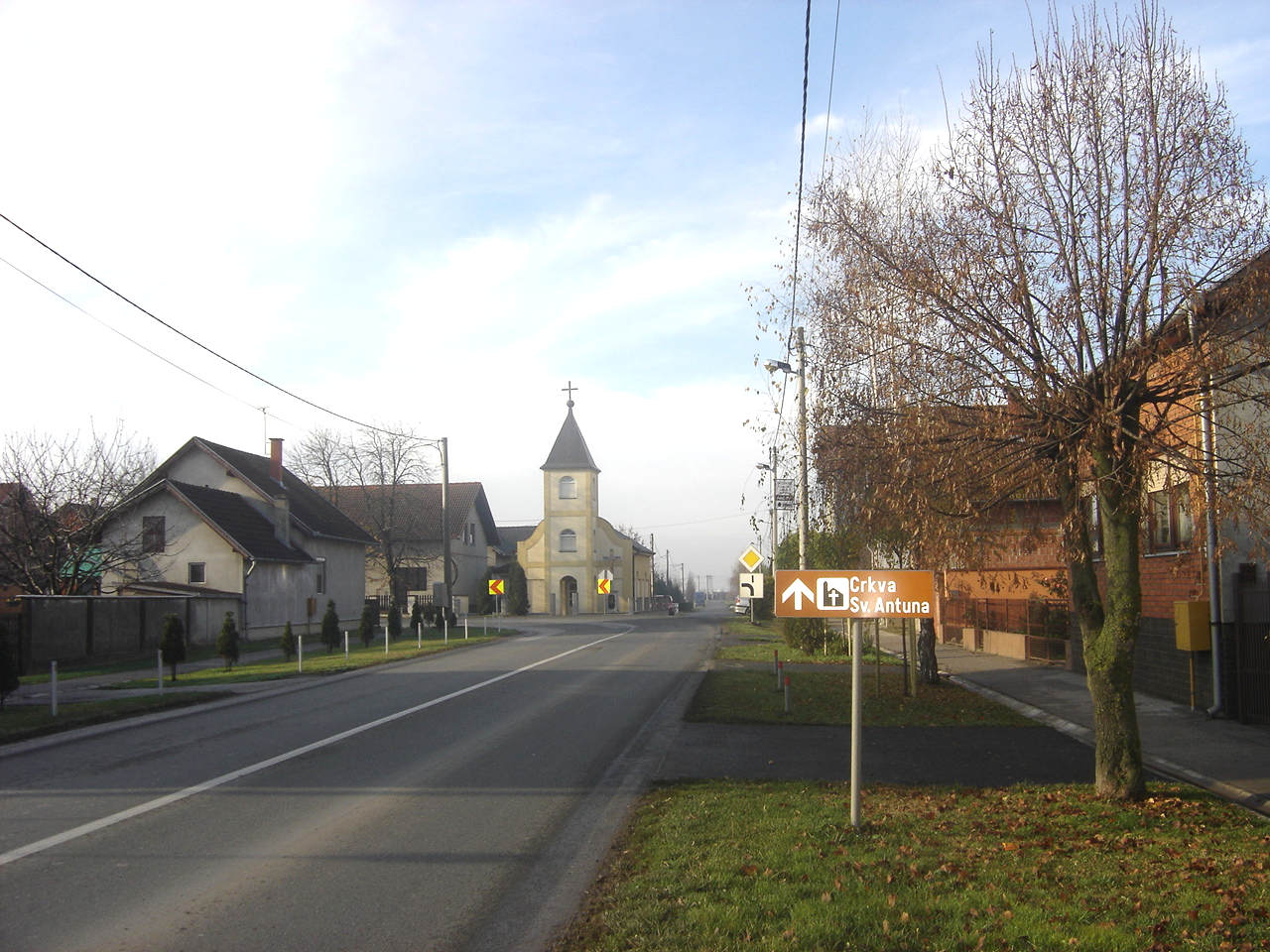 Crkva svetog Antuna u Antunovcu